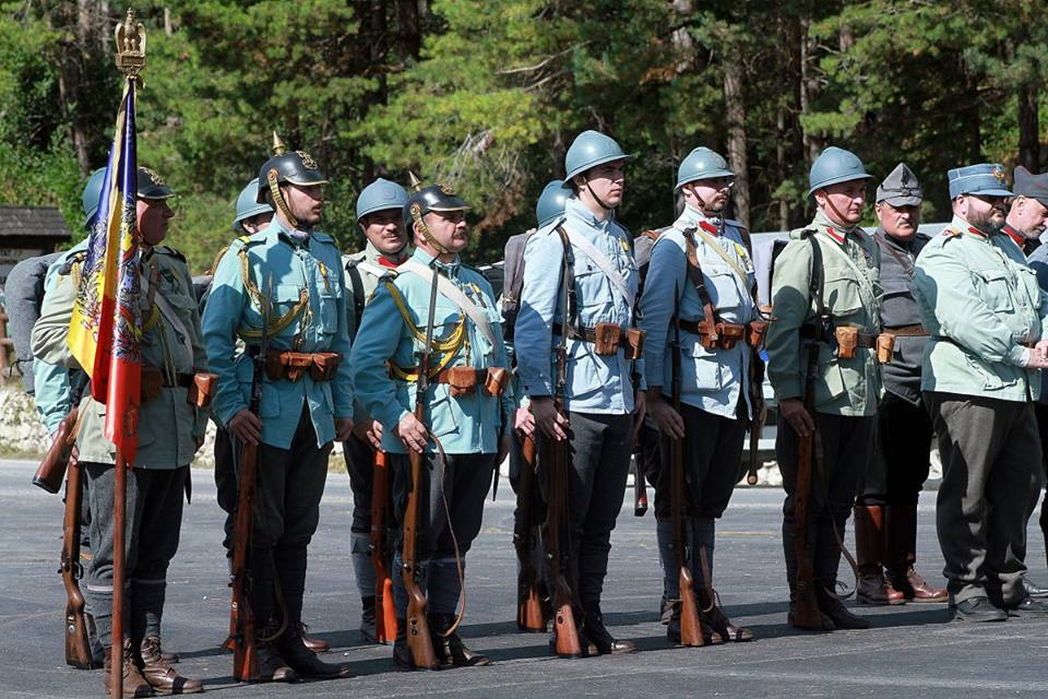 Asociatia Traditia Militara